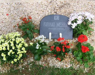 Farhad Mehrad